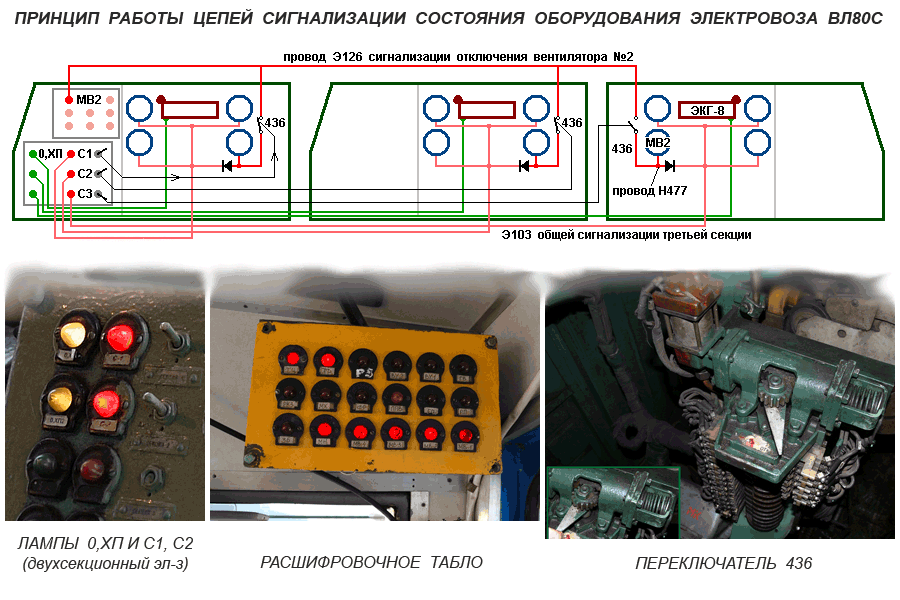 Принцип действия цепей сигнализации оборудования электровозов ВЛ80С, 2ЭС4К, 2ЭС5К